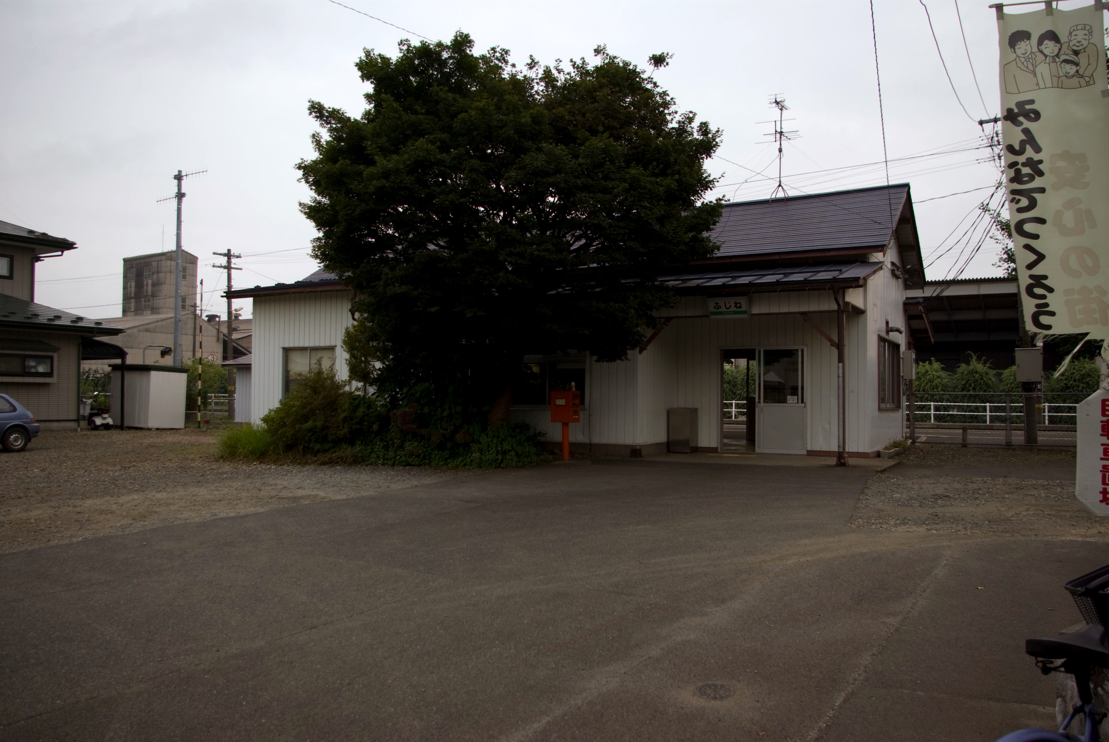 東日本旅客鉄道株式会社北上線藤根駅